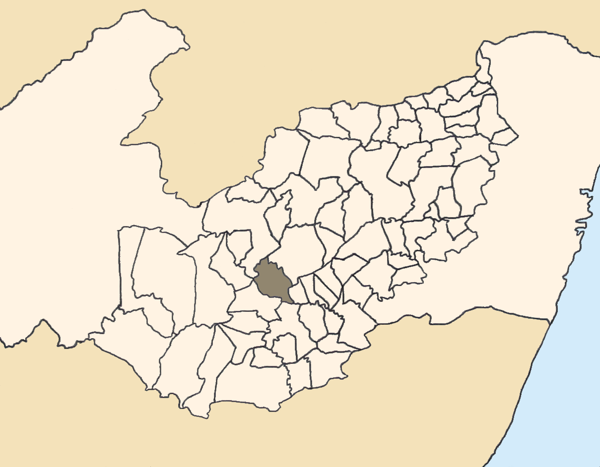 Mapa da mesorregião Agreste de Pernambuco (Brasil) subdivida em municípios. Em destaque, o município de Capoeiras. Map of the brazilian state of Pernambuco (mesorregião Agreste) showing the city of Capoeiras. Imagem tratada com o GIMP. Image made with GIMP.